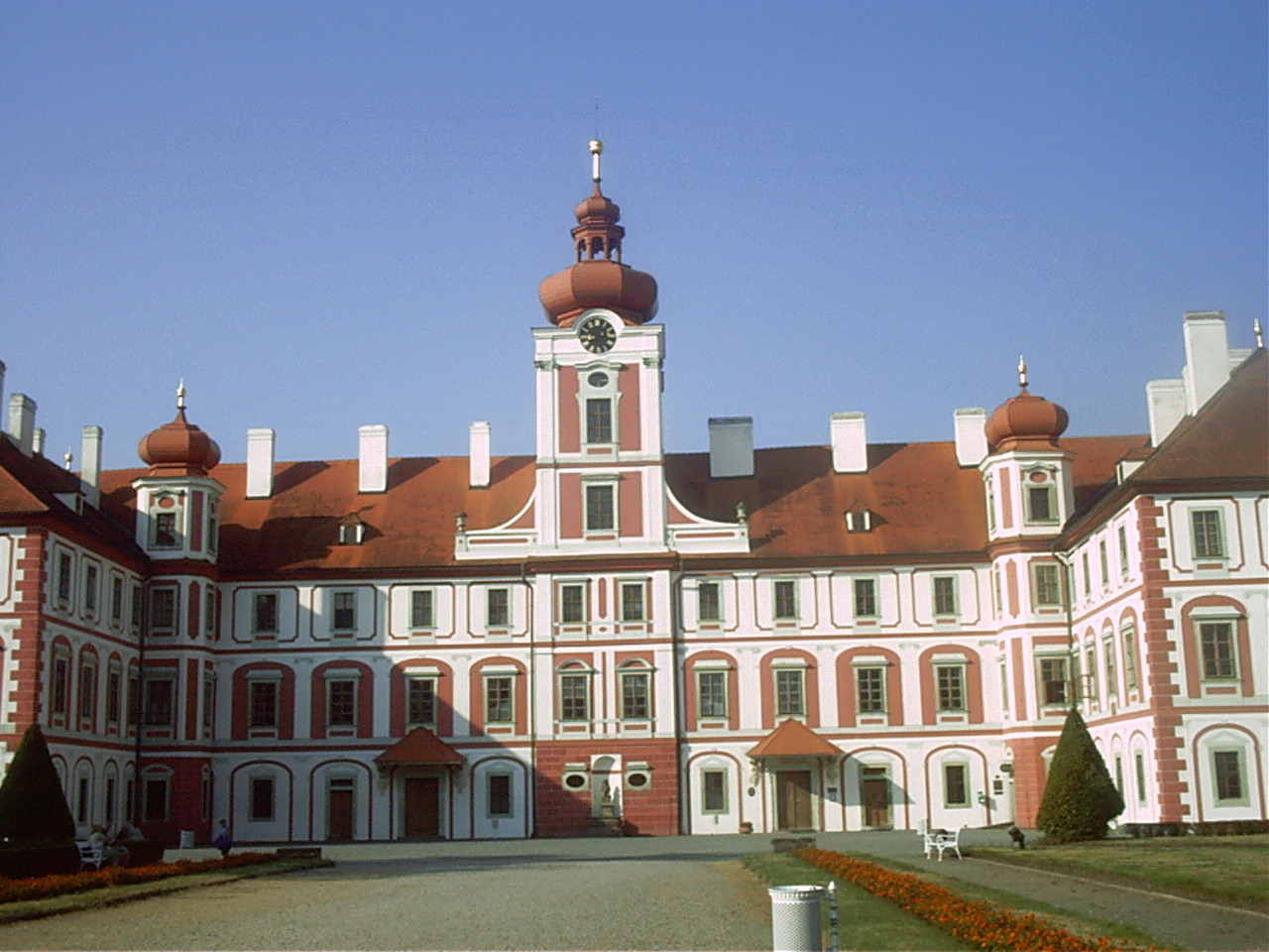 zámek Mnichovo Hradiště